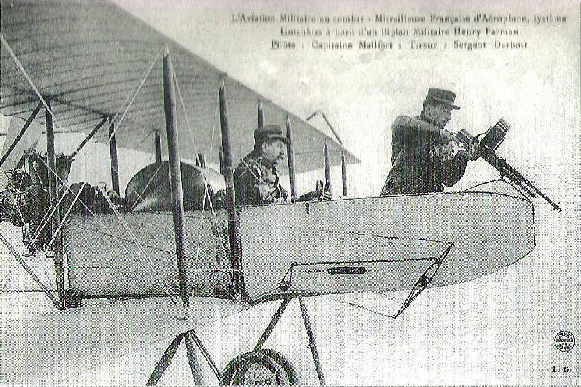 A Bouy les militaires Mailfert et Darbois.